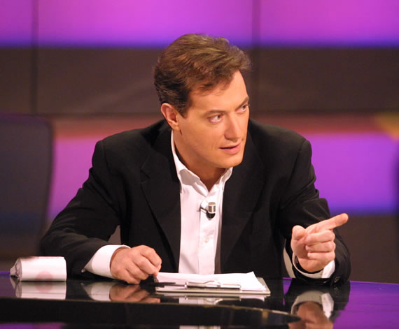 Foto di Scafroglia, personaggio di Corrado Guzzanti